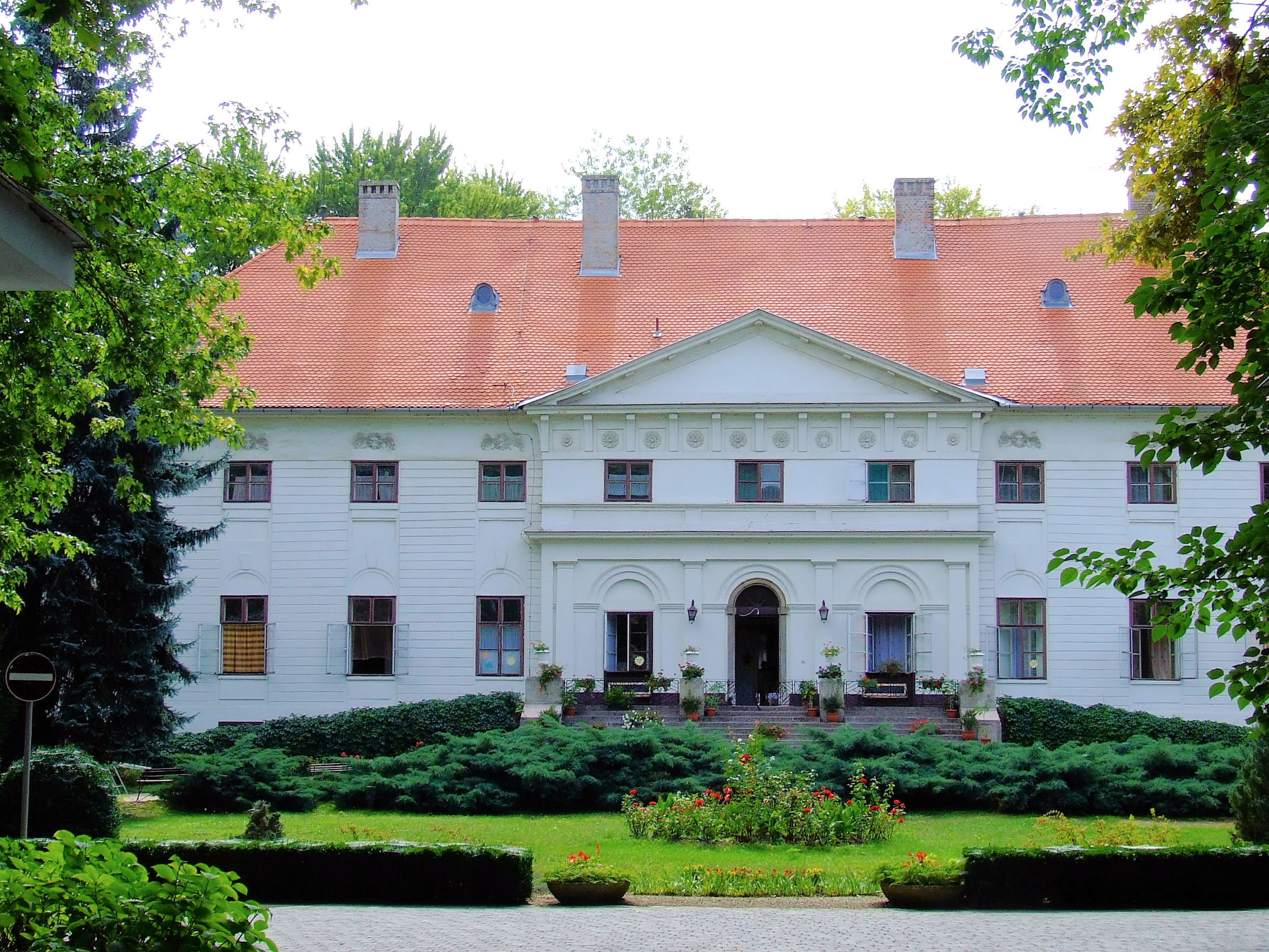 A Batthyány–Montenuovo-kastély Bólyban